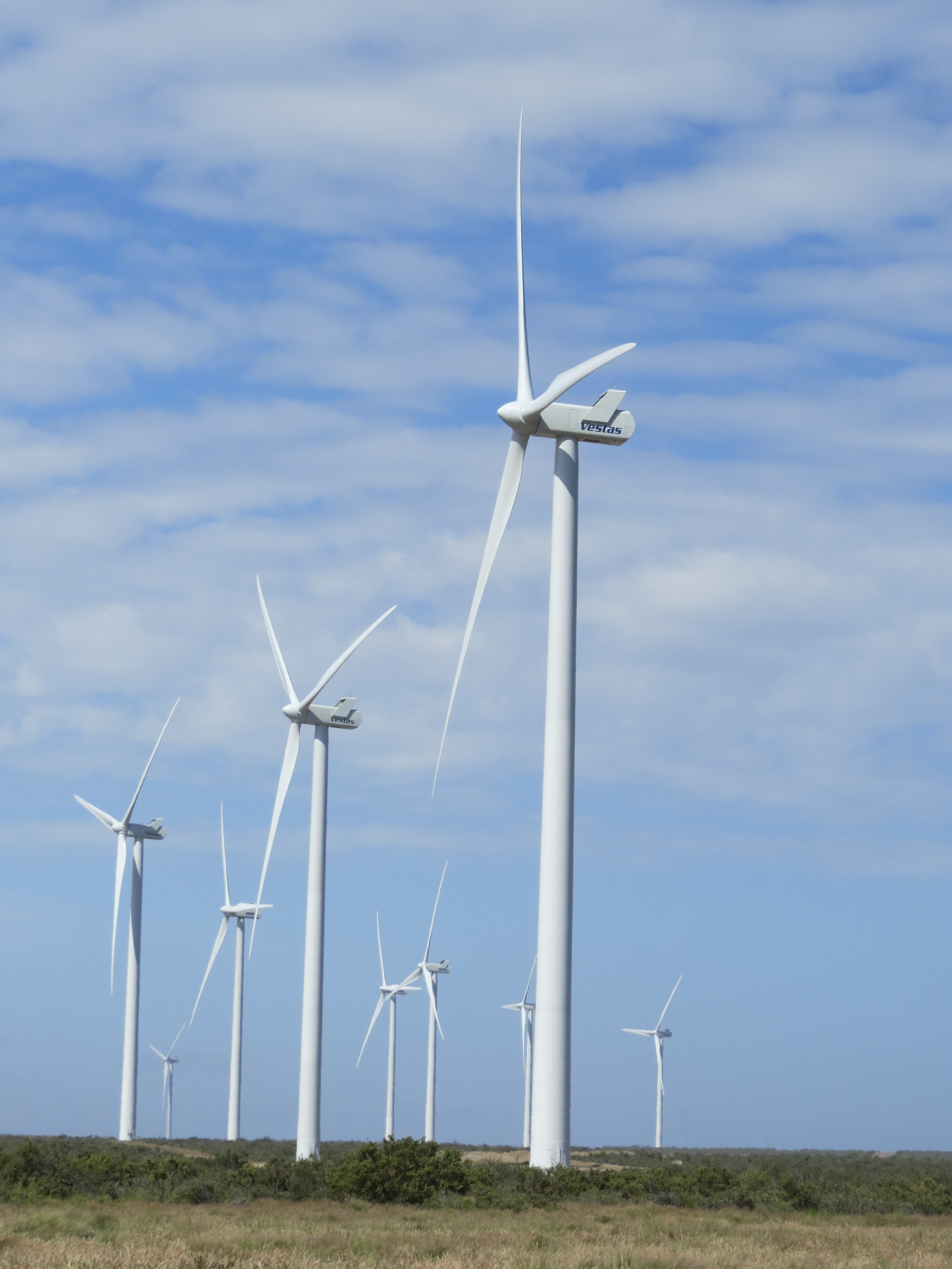 Parque Eólico Rawson, Prov. de Chubut.